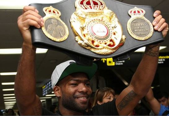 Jezrrel Corrales